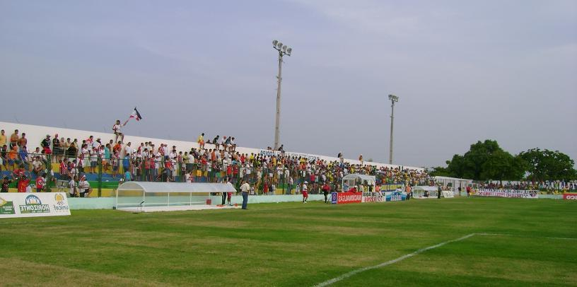 Estádio Francisco Clenilson dos Santos (Clenilsão), em Horizonte, Ceará, Brasil.